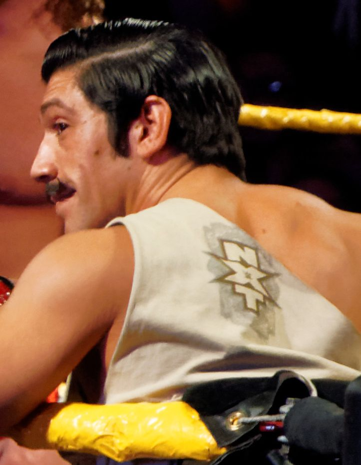 2015-03-27_23-53-31_ILCE-6000_3701_DxO